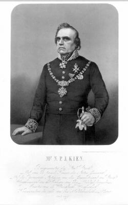 Nicolaas Kien